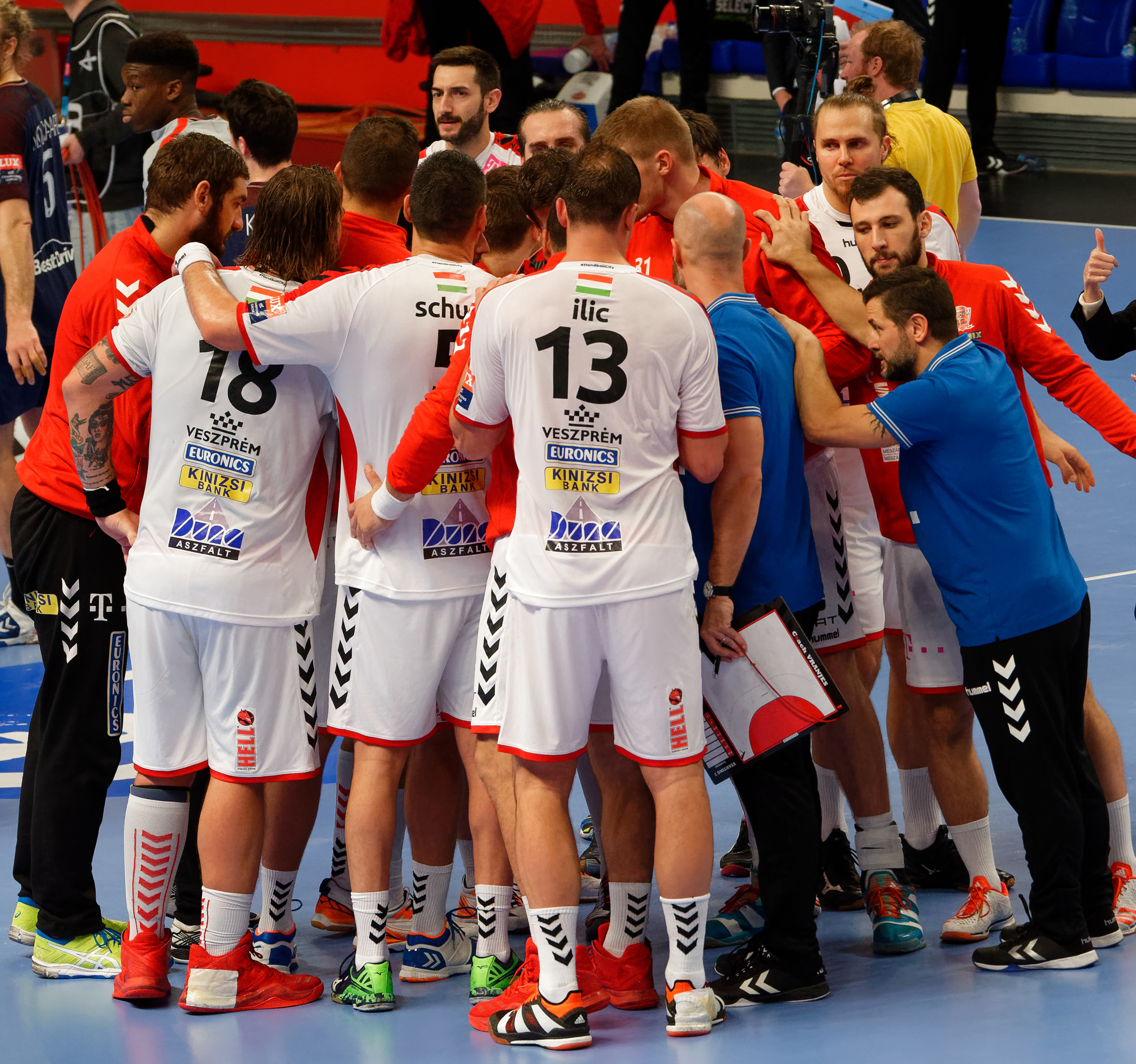 Rencontre de phase de groupe de la ligue des champions 2017/18 entre le PSG et Veszprem. A Coubertin, le 12 novembre 2017.